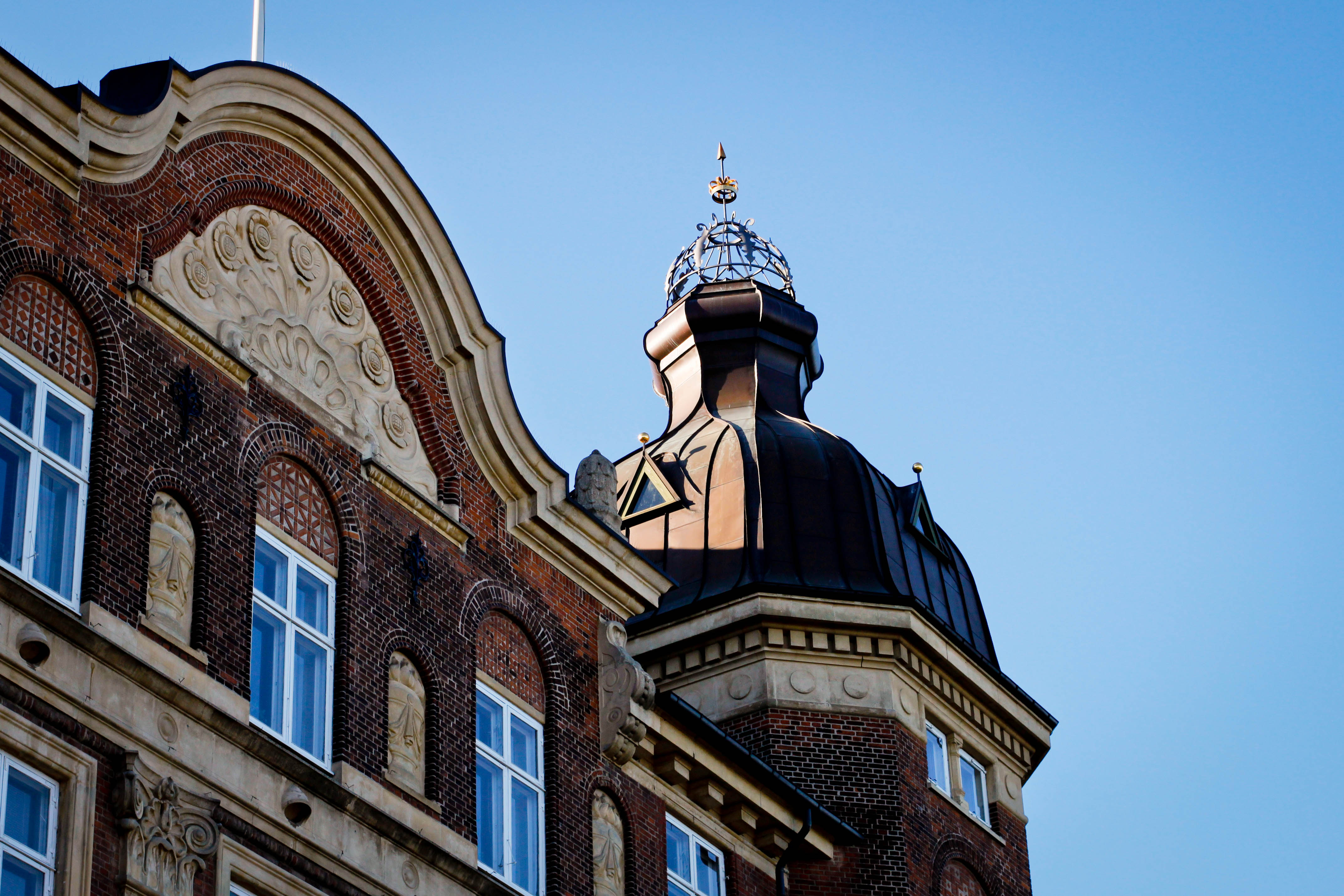 Facade detail on 1 Grønningen (corner with Esplanaden) in Copenhagen, Denmark